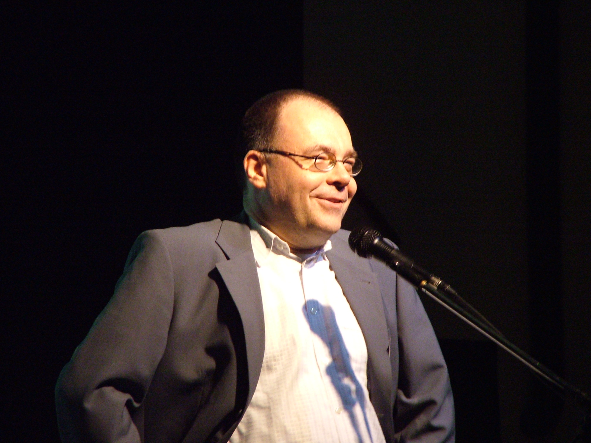 Martin Haase, prezidinto de GEJ, dum prelego en IS 2006/2007, Wewelsburg, pri kvindekfojigxo de IS